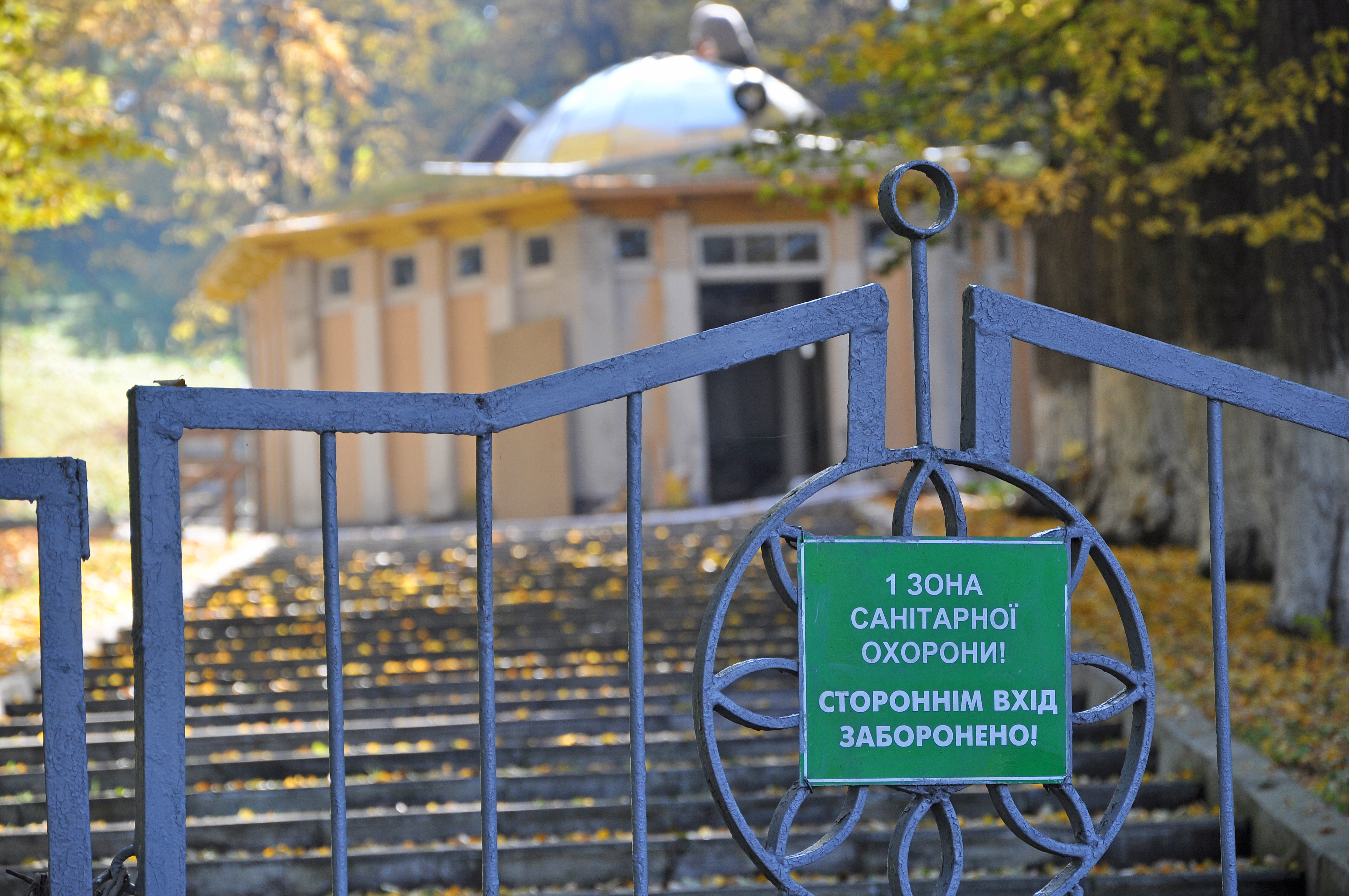 Место где рождается Нафтуся в Трускавце (1-я санитарная зона курорта).